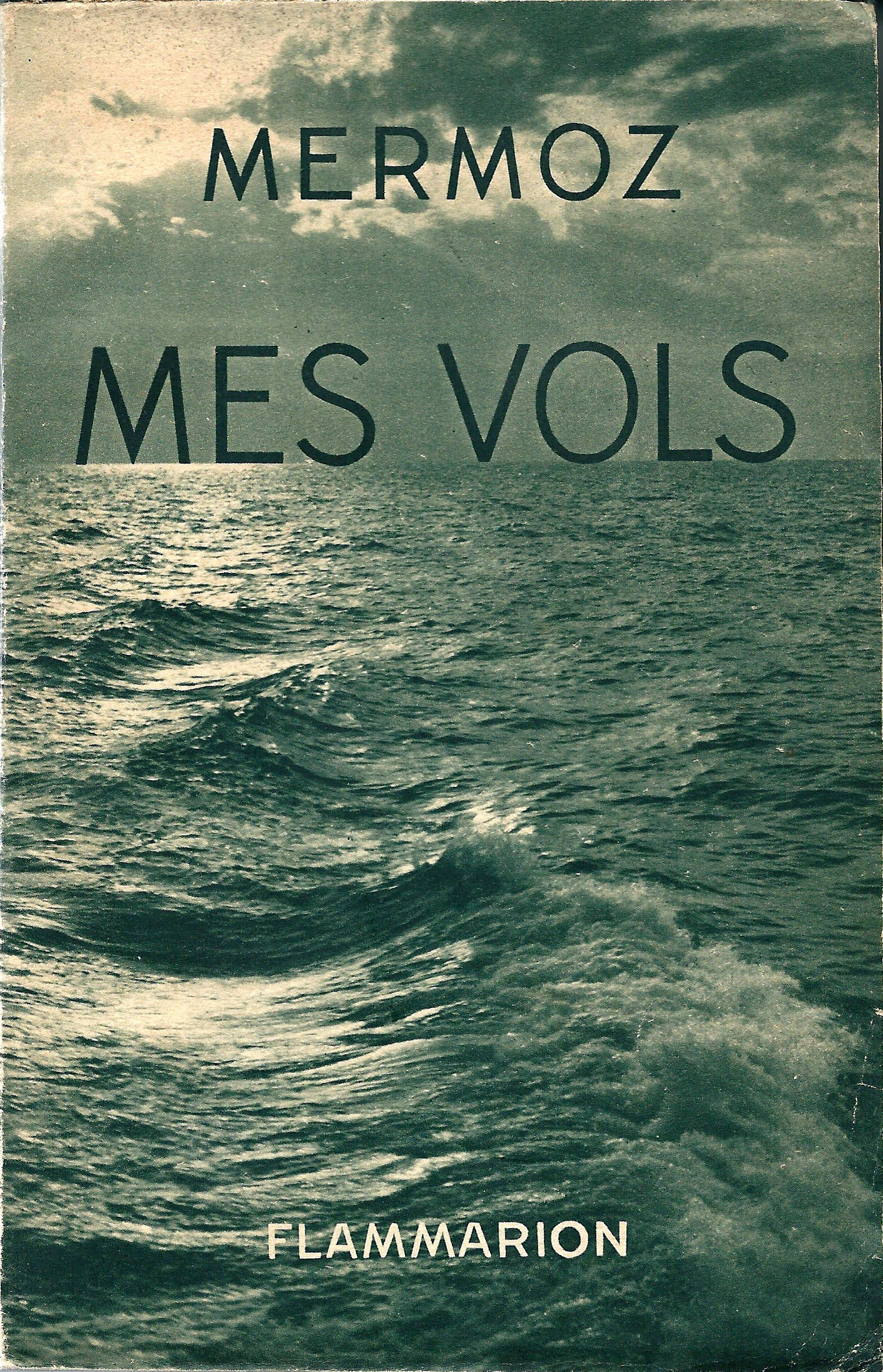 Couverture de l'édition originale (1937) de l'ouvrage Mes Vols, de Jean Mermoz.